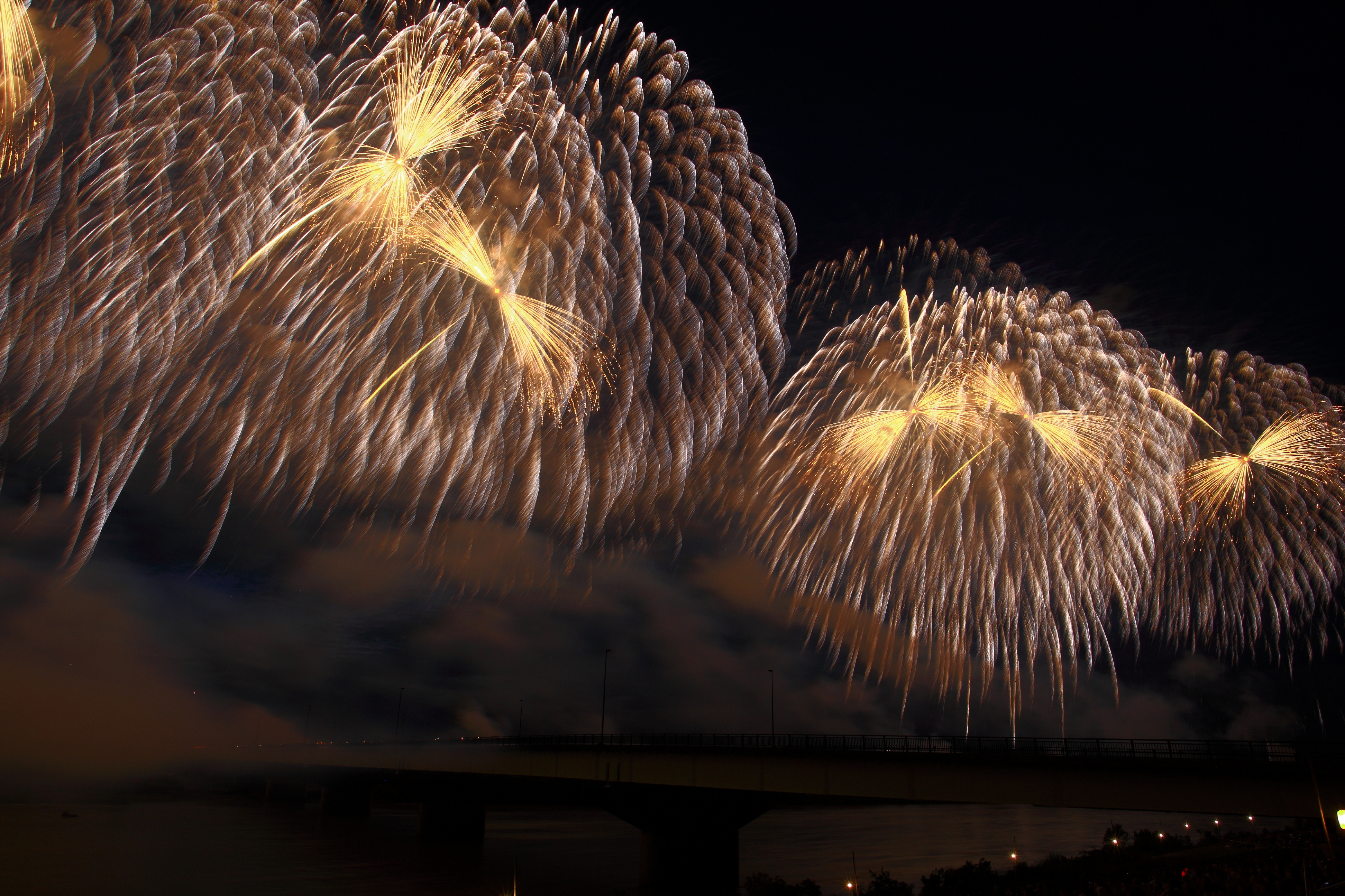 2011年に開催された長岡祭で打ち上げられた、復興祈願花火 フェニックス